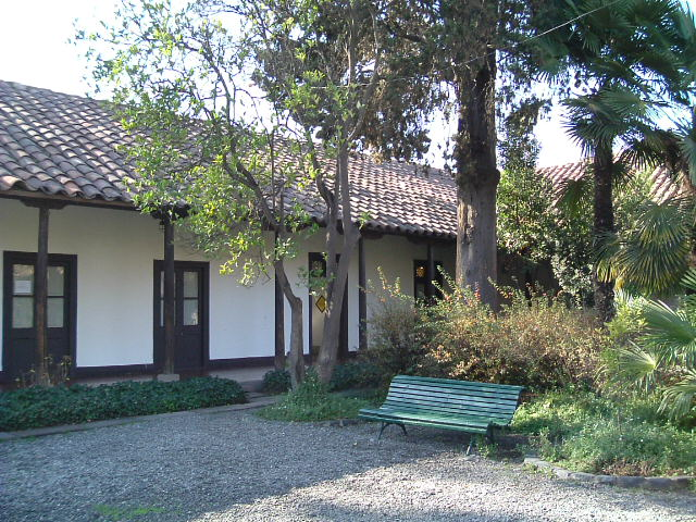 Patio Lo Contador